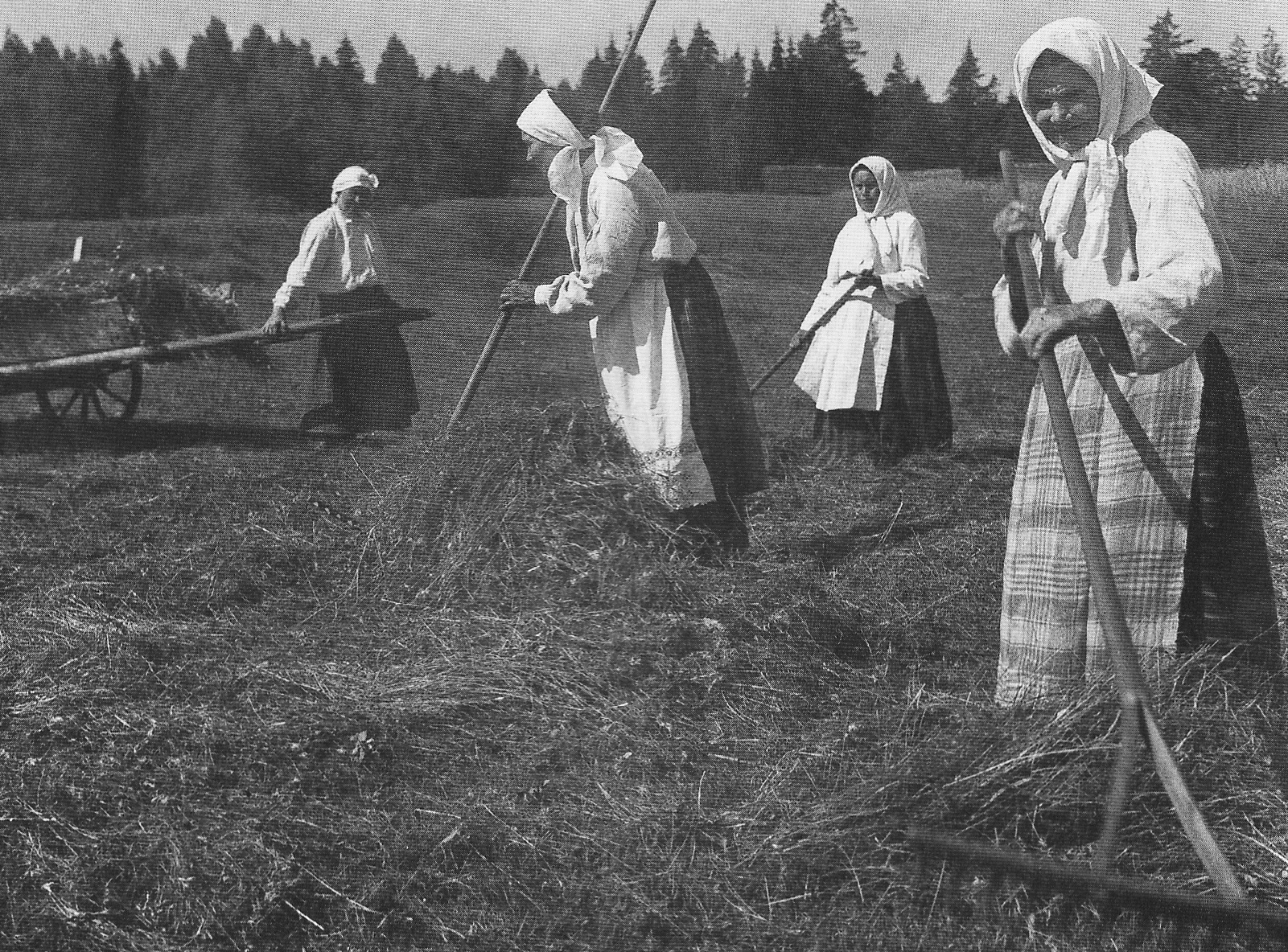 P. Šinkis "Asiūklynės kaimo grėbėjos". Fotografija pateikta Panevėžio kraštotyros muziejaus knygoje "Povilas Šinkis" fotografija".